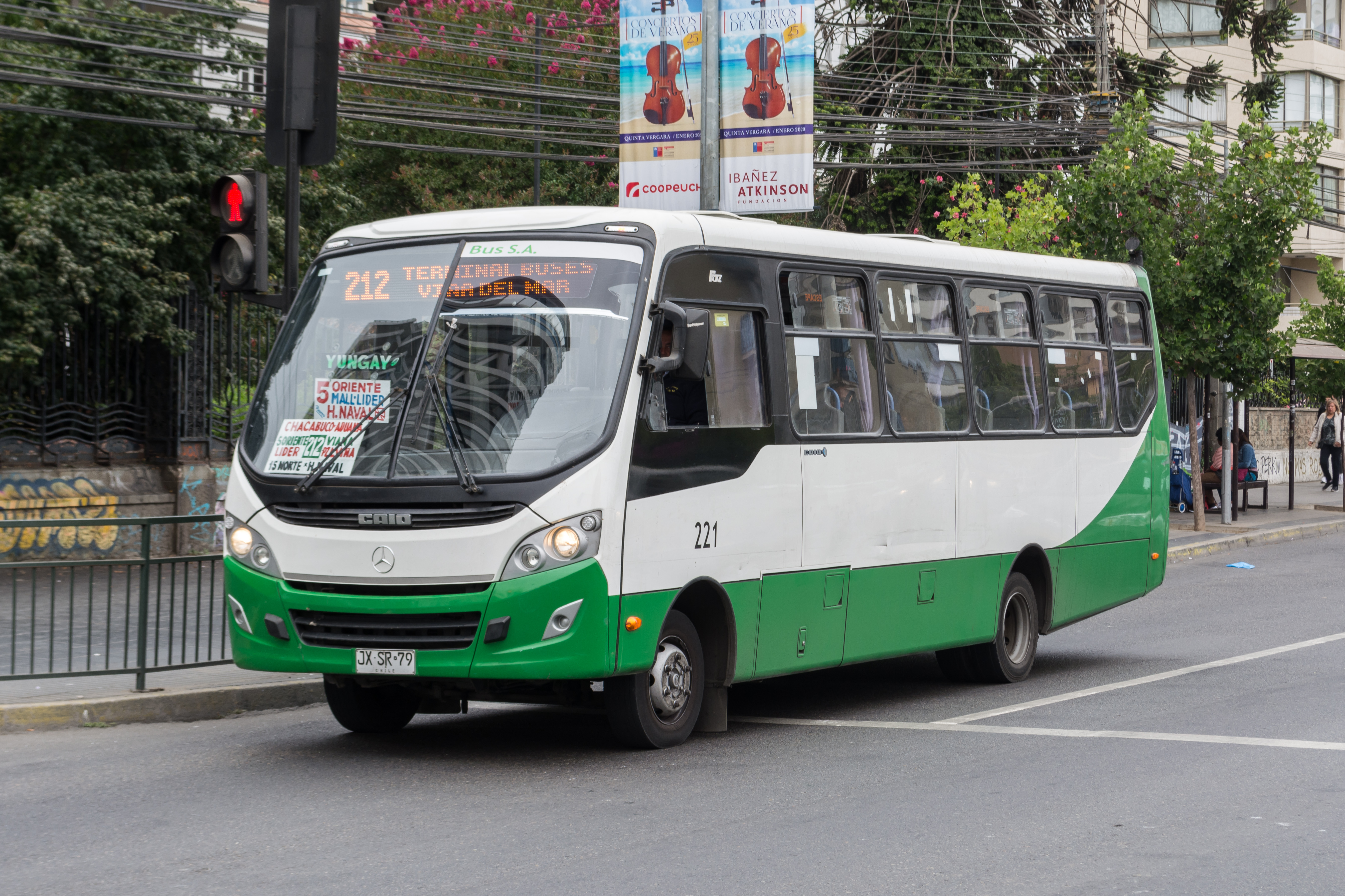 Bus línea 212 TMV, Viña del Mar, Región de Valparaíso, Chile